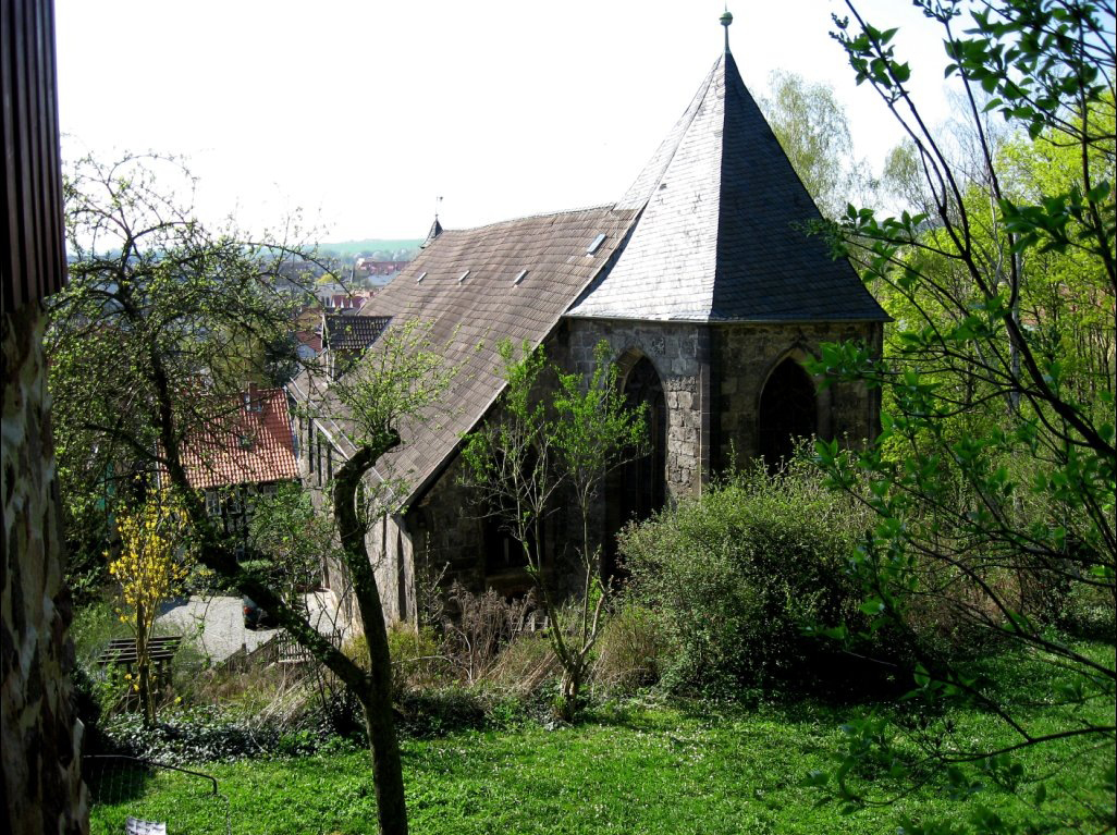 99734 Nordhausen - Altendorfer Kirche - "Beatae Mariae virginis in valle"